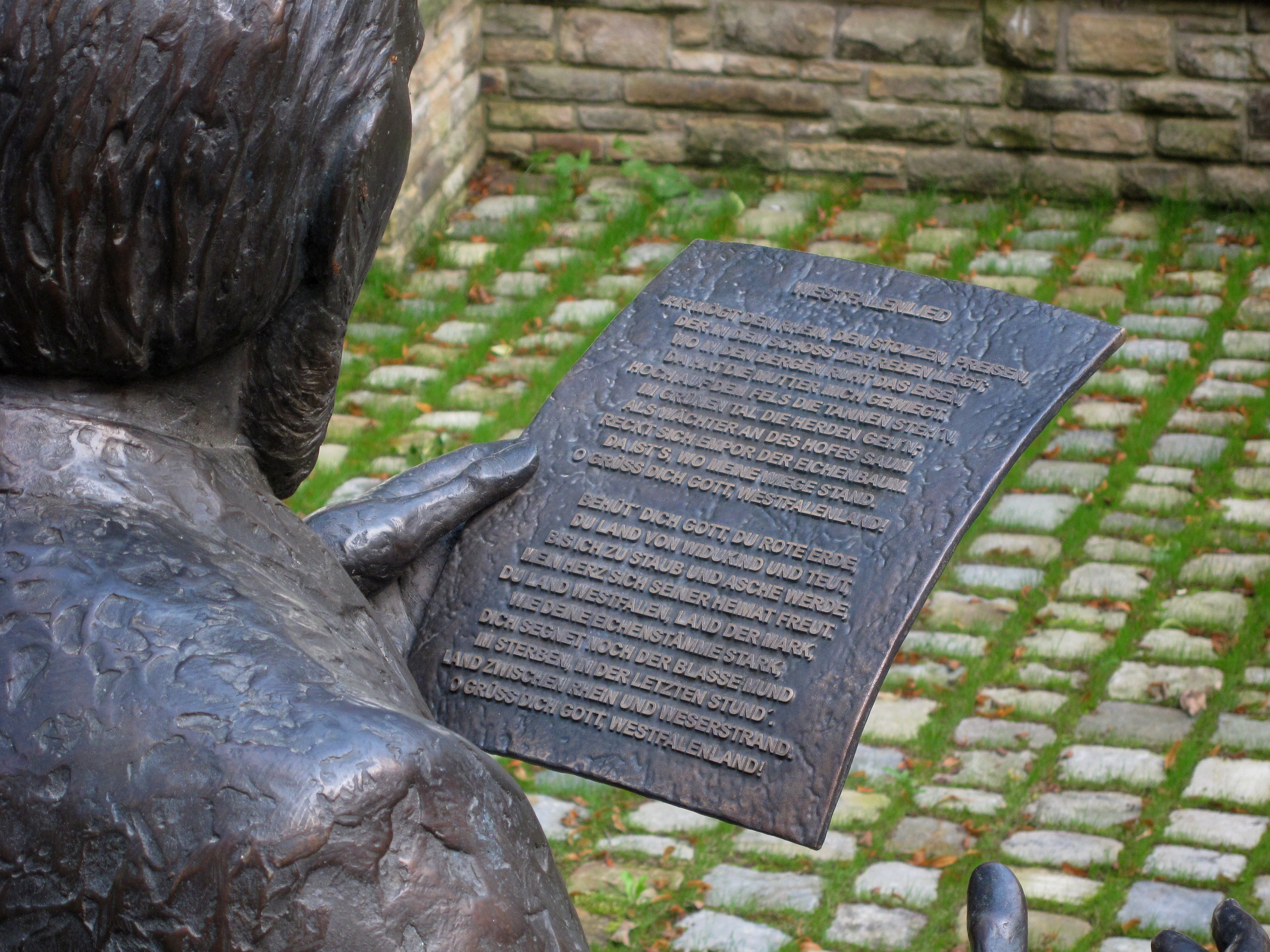 Erinnerungsstätte an den Dichter des Westfalenliedes Emil Rittershaus in Menden-Bertingloh.